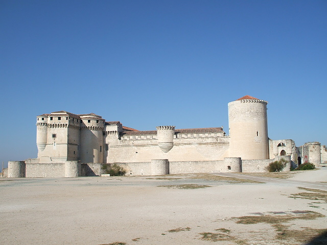 Castillo de Cuéllar